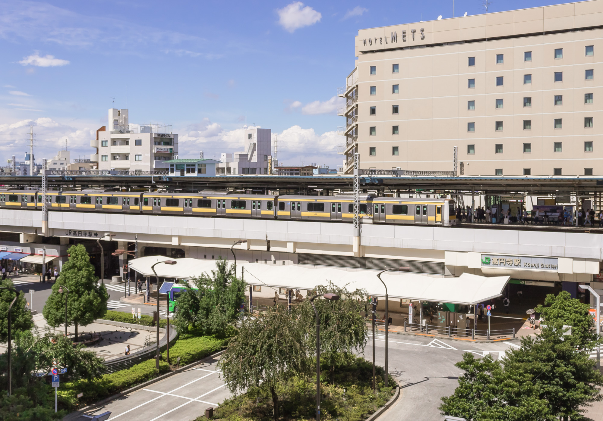 高円寺駅南口